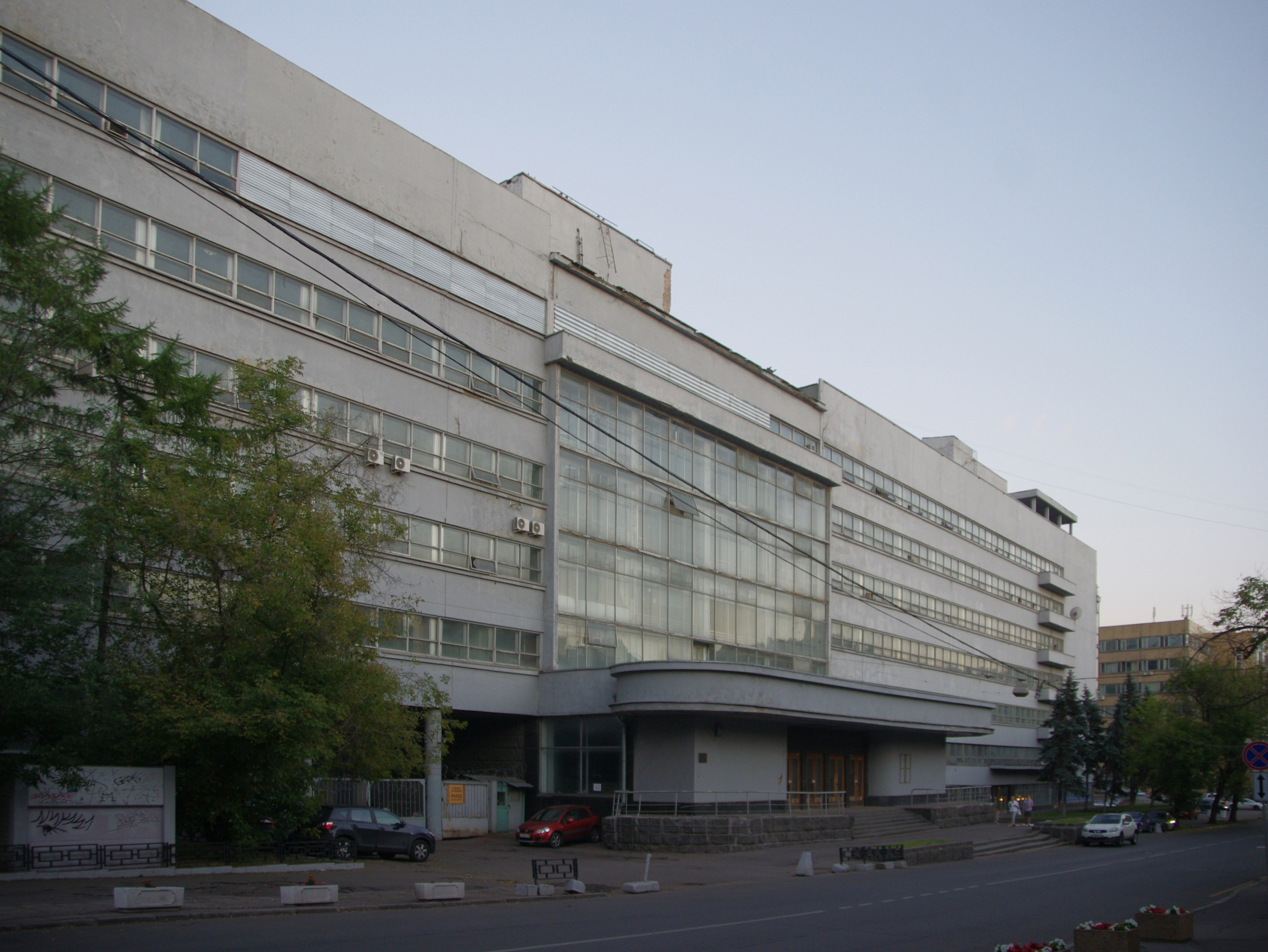 Издательство Правда 1934